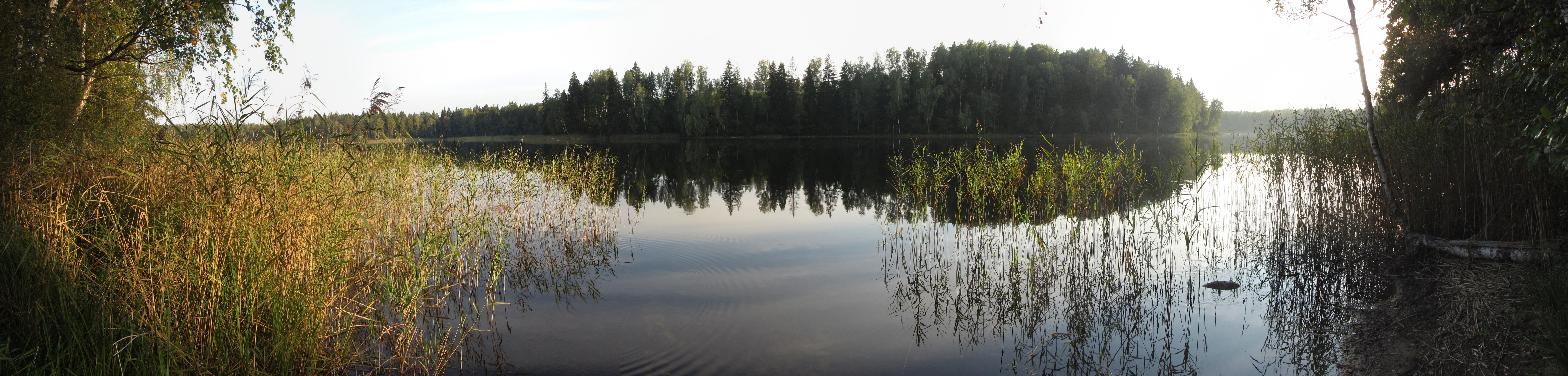 Suginčių sen., Lithuania